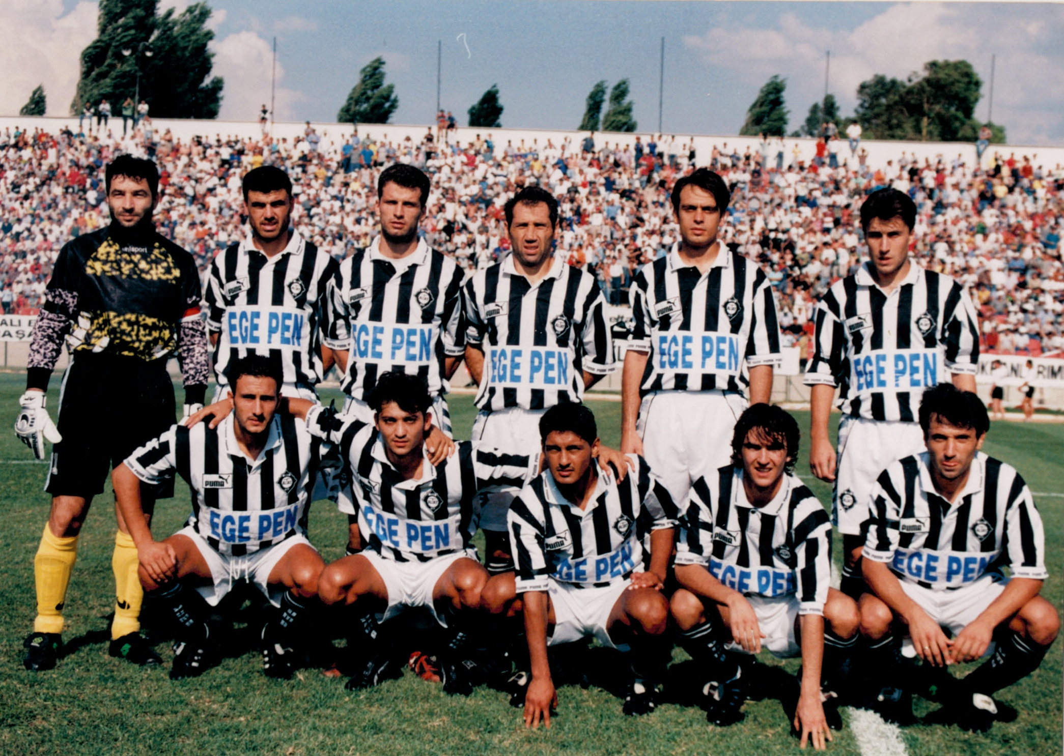 Altay Izmir 10.08.1997